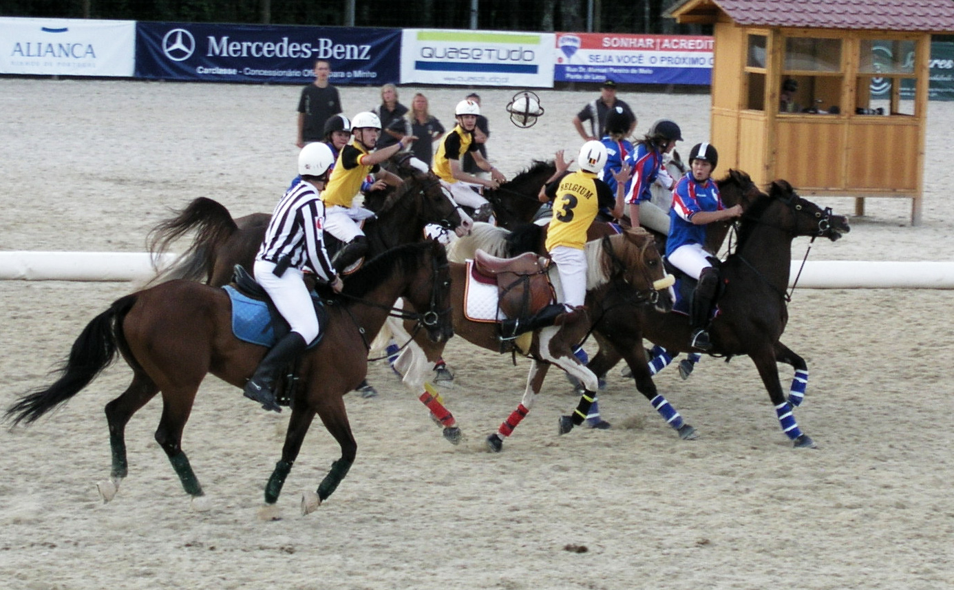 FIHB-Horsball World Cup: Campeonato da Europa Juniores (Sub-16 anos), Bélgica-Inglaterra, Ponte de Lima, Portugal